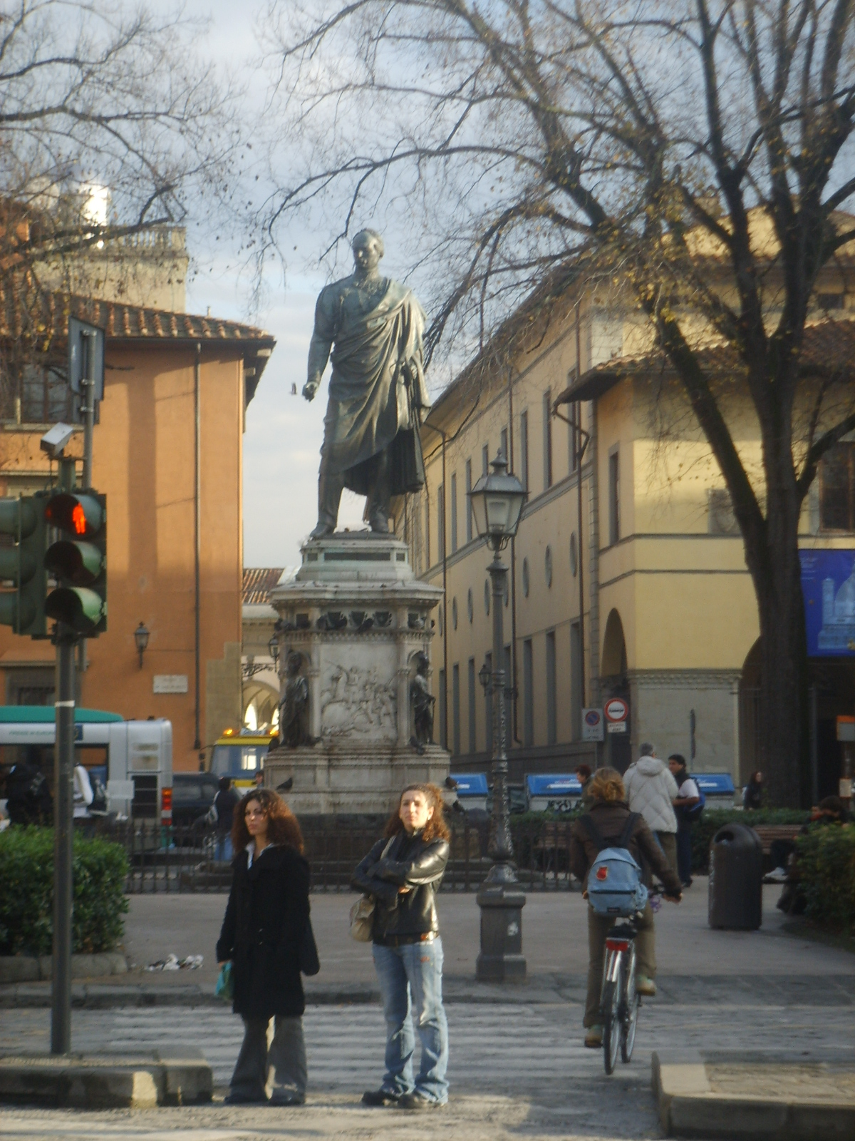 Piazza Sa Marco, square in Florence, statue of General Manfredo Fanti